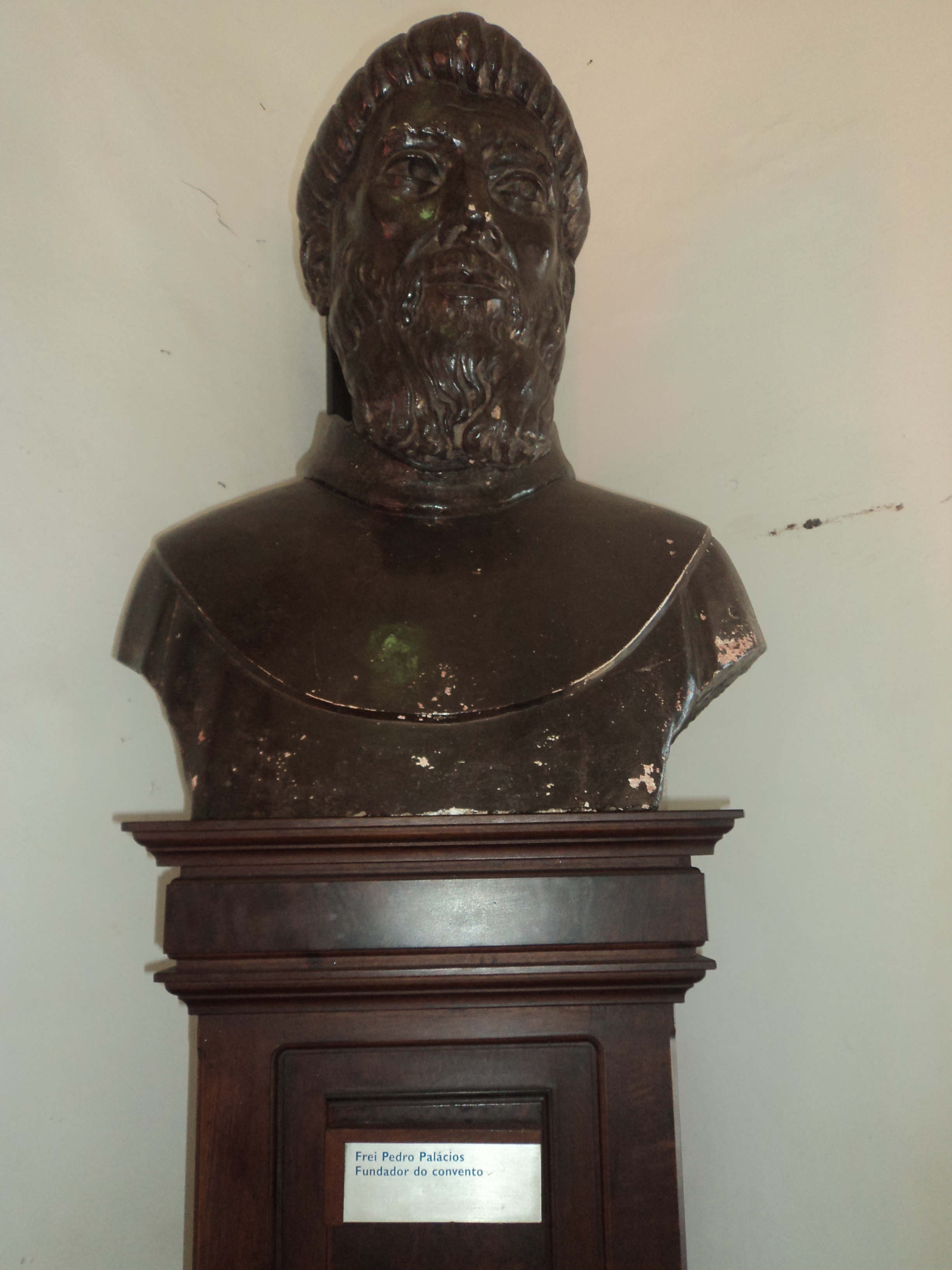 Frei Pedro Palácios, fundador do Convento da Penha, Vila Velha, Brasil